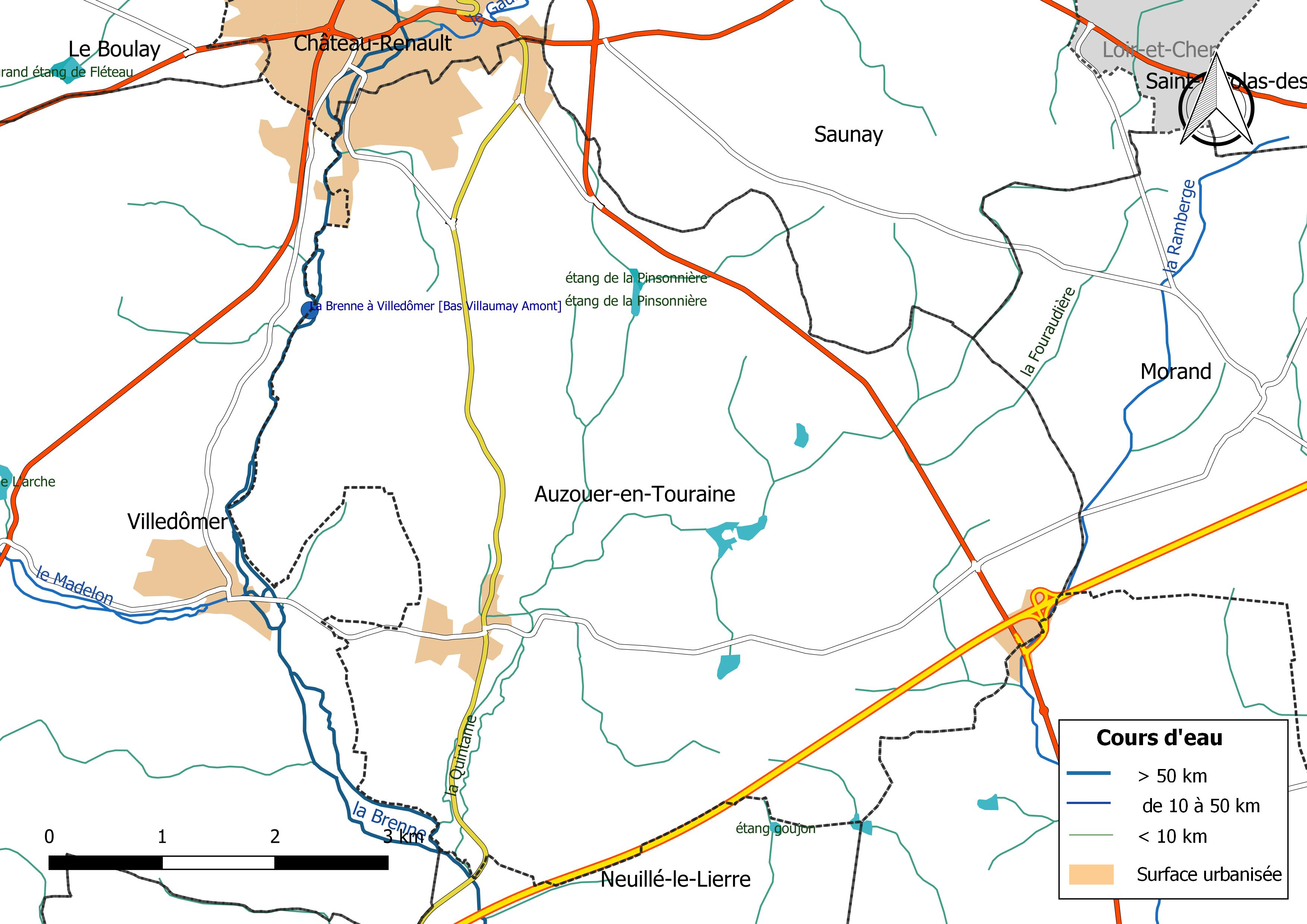 Carte du réseau hydrographique de la commune de Auzouer-en-Touraine (France).